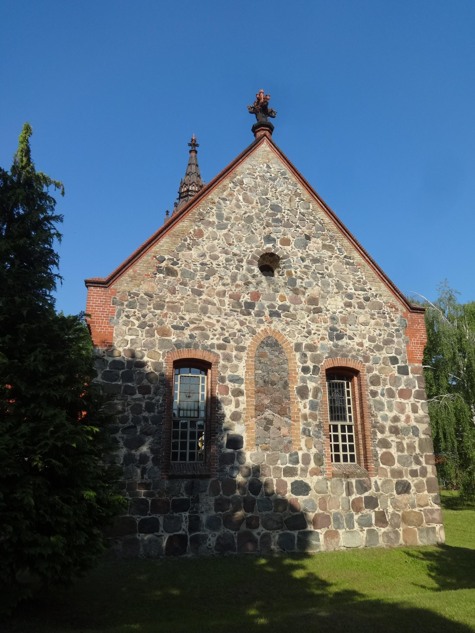 Die Paul-Gerhardt-Kirche ist eine Feldsteinkirche aus dem Jahr 1710, die auf einem Vorgängerbau aus dem 14. Jahrhundert basiert. Der neugotische Westturm ist eine Kopie der Kirche im polnischen Troszyn (Mieszkowice). Im Innern befinden sich ein Kanzelaltar aus dem Jahr 1702 sowie eine weitgehend im Originalzustand befindliche Orgel von Wilhelm Sauer aus dem Jahr 1906.